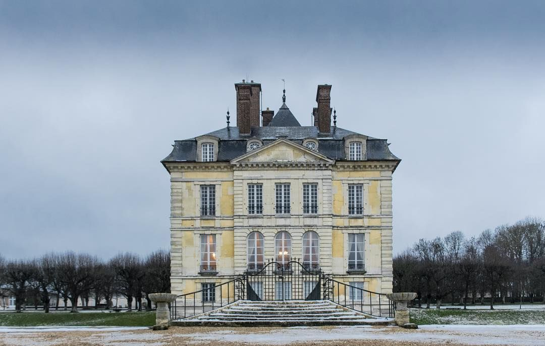 Ce château est privé, aussi la vue est prise depuis la rue, sans téléobjectif. It is indexed in the Base Mérimée, a database of architectural heritage maintained by the French Ministry of Culture, under the references PA00079897 and PA00079926 .